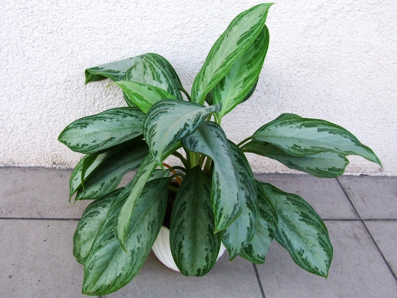 Aglaonema commutatum 'Silver Queen'